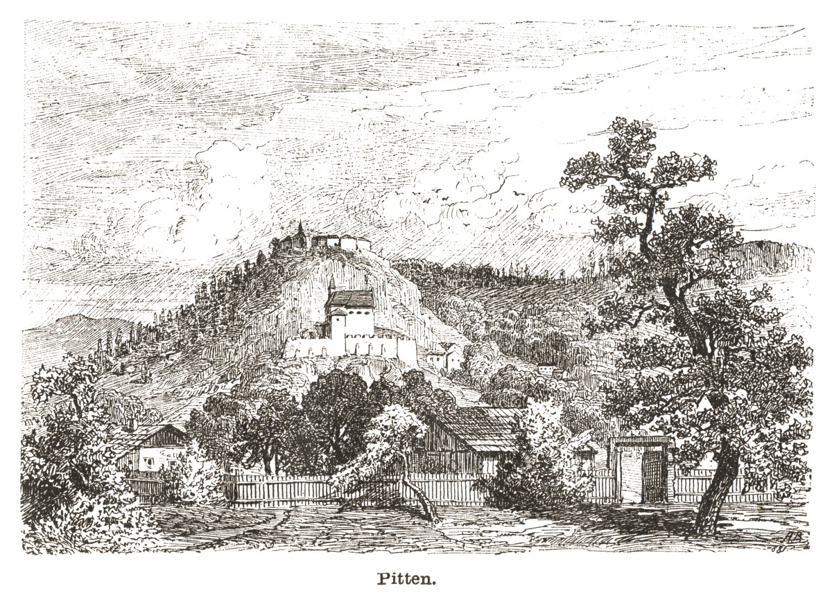 Pitten historischer Stich von 1882